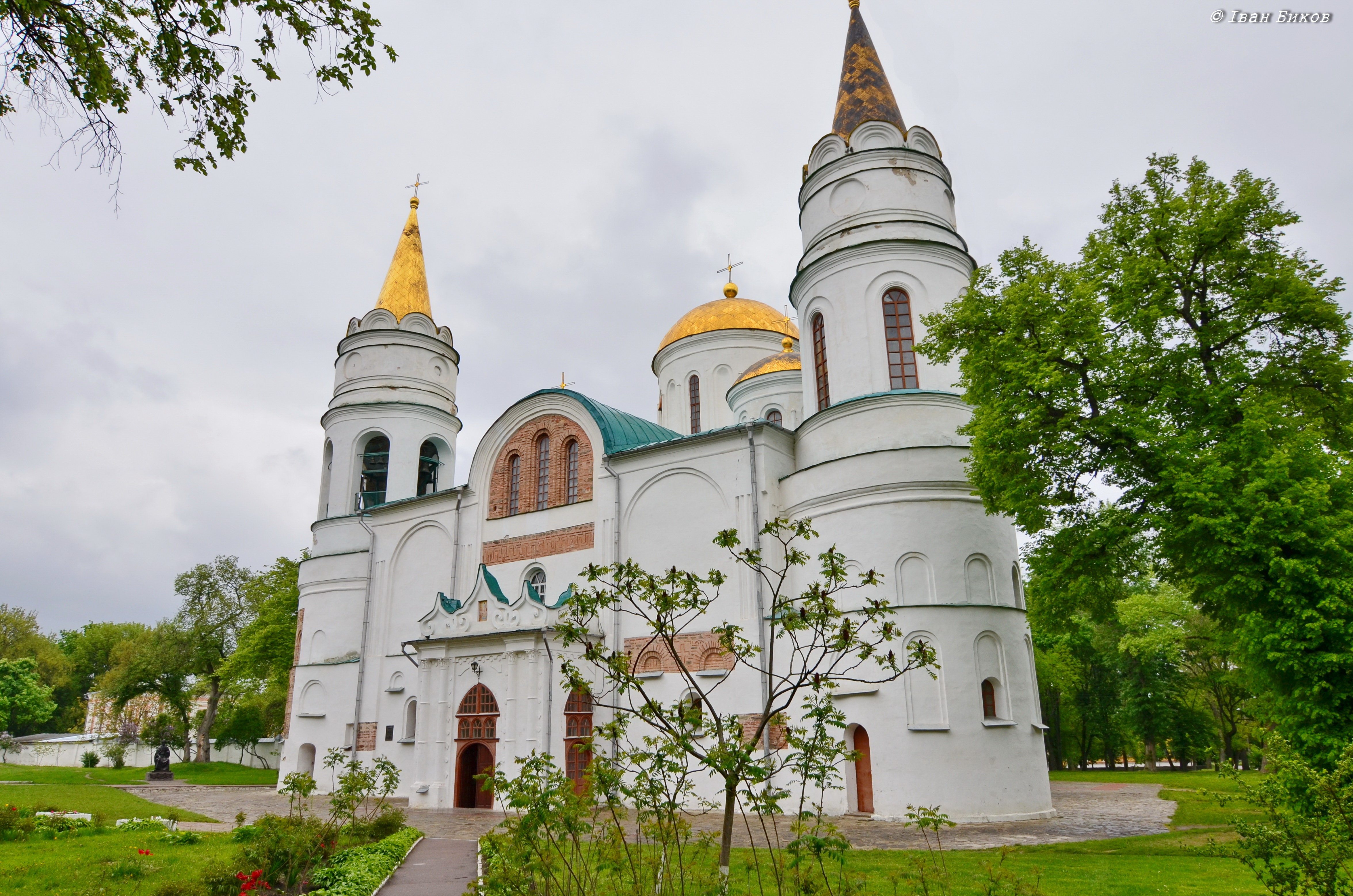 м. Чернігів. Спасо-Преображенський собор. 1036 рік побудови. Унікальна давньоруська пам'ятка.